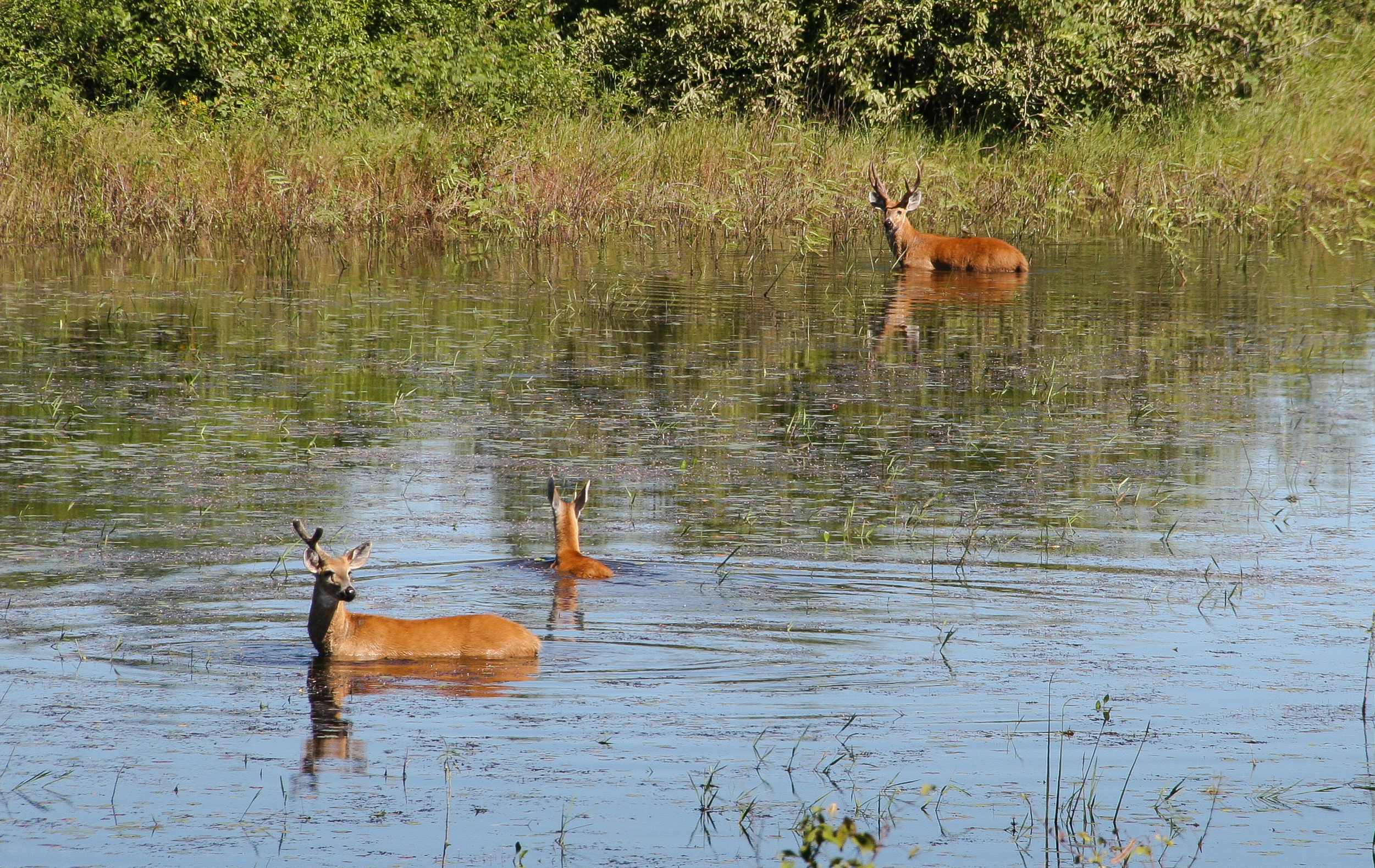 O cervo-do-pantanal é um animal de rara visualização no pantanal.